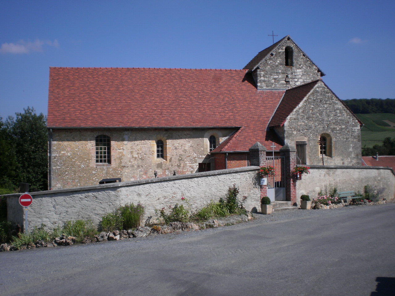 Eglise saint Remi de Pourcy